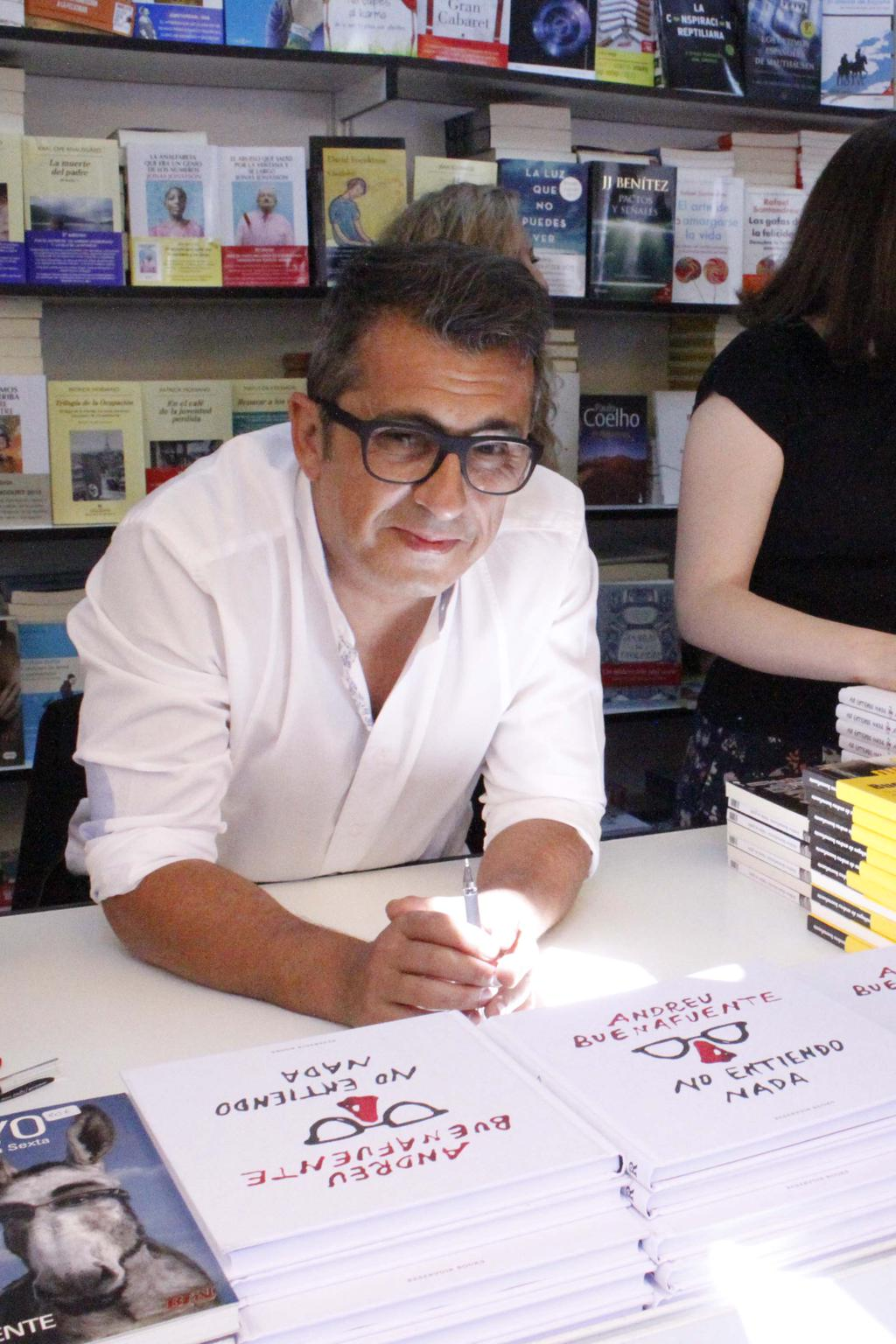 Andreu Buenafuente en la Feria del Libro de Madrid